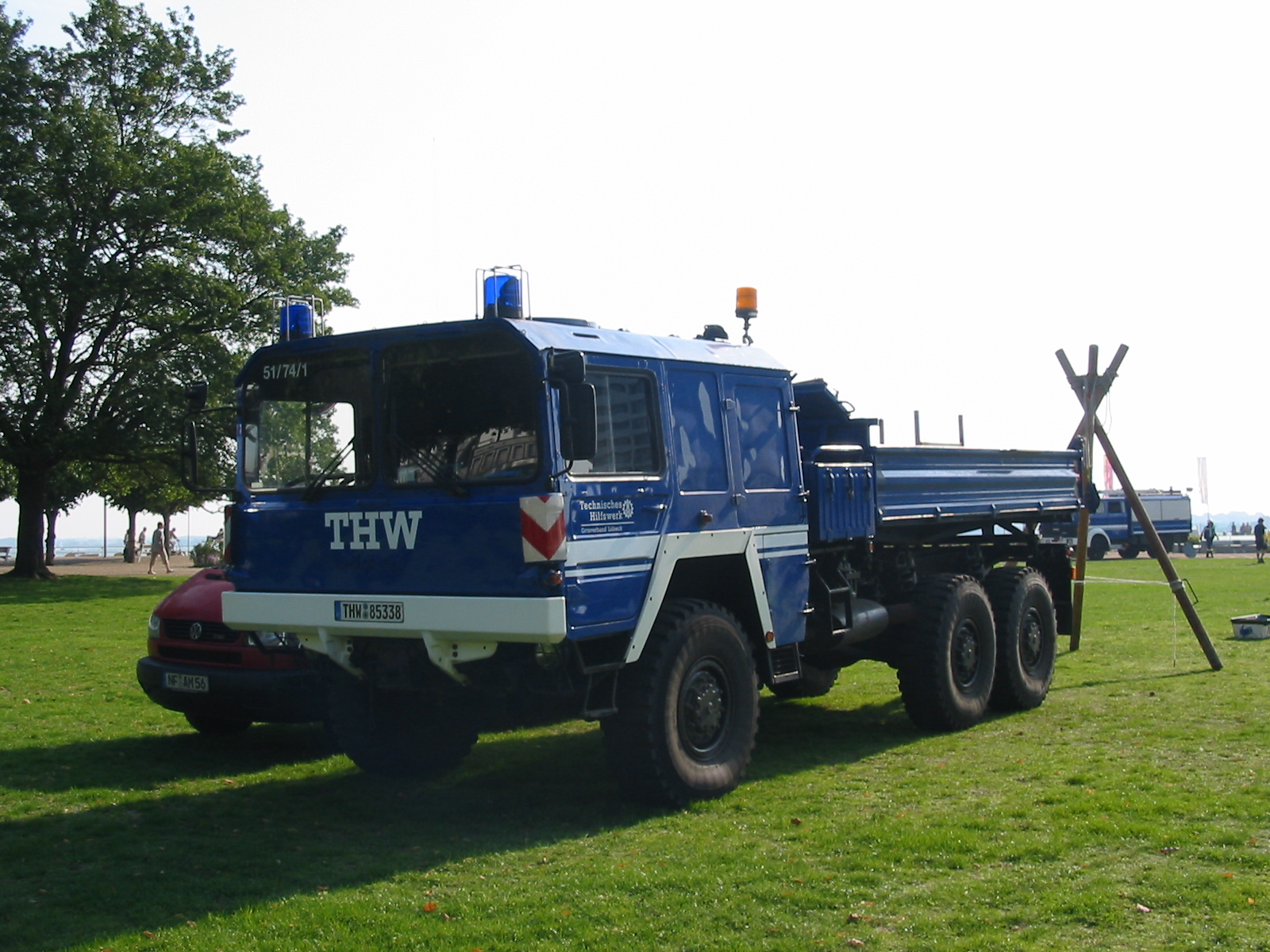 Technisches Hilfswerk six-wheel lorry at volunteer fair in Travemünde.